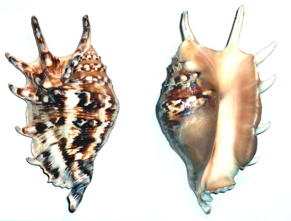 Lambis lambis, mâle. Auteur : Barruel M.